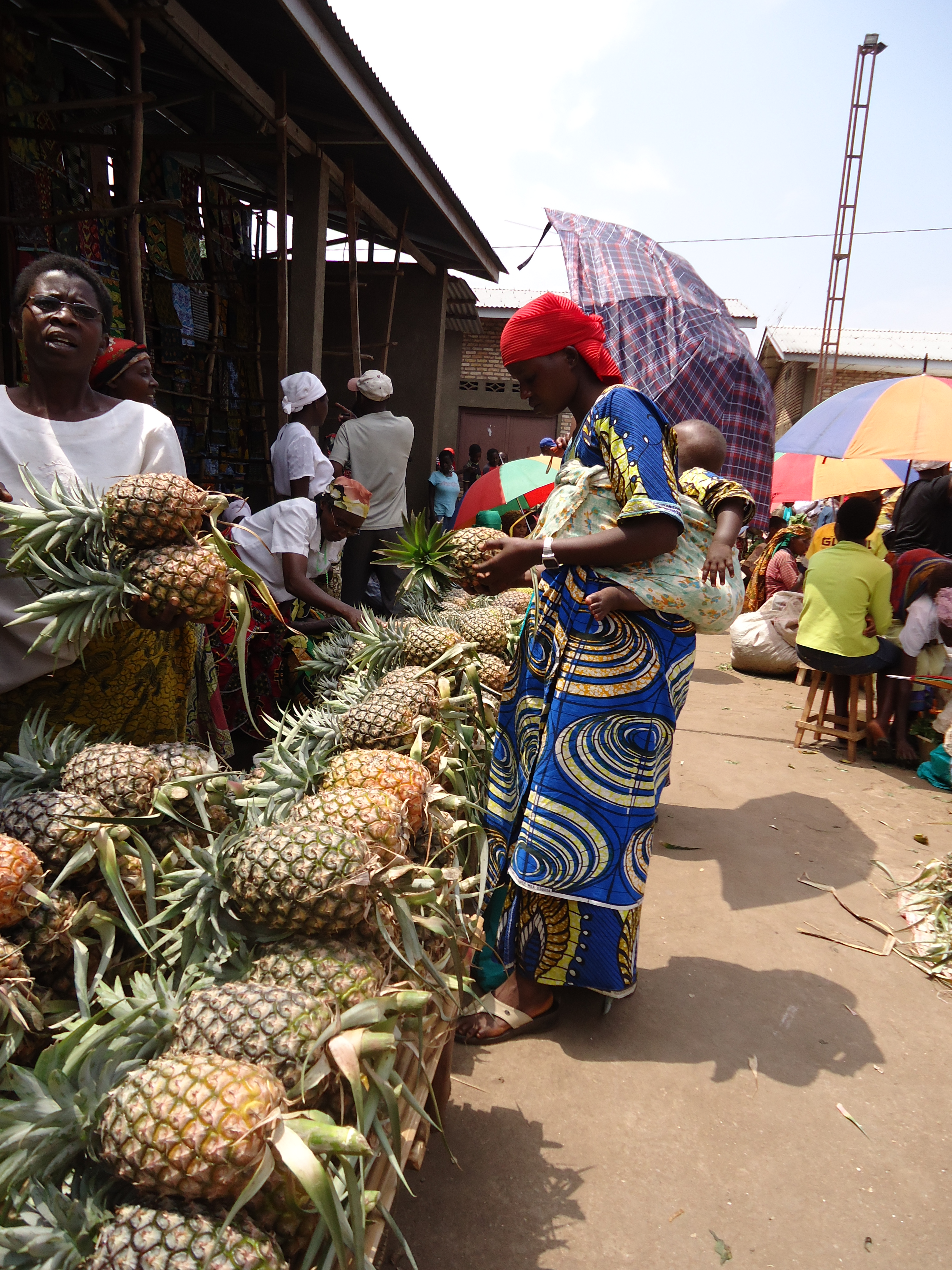 Marché de Bubanza, Burundi This is an image of food from Burundi